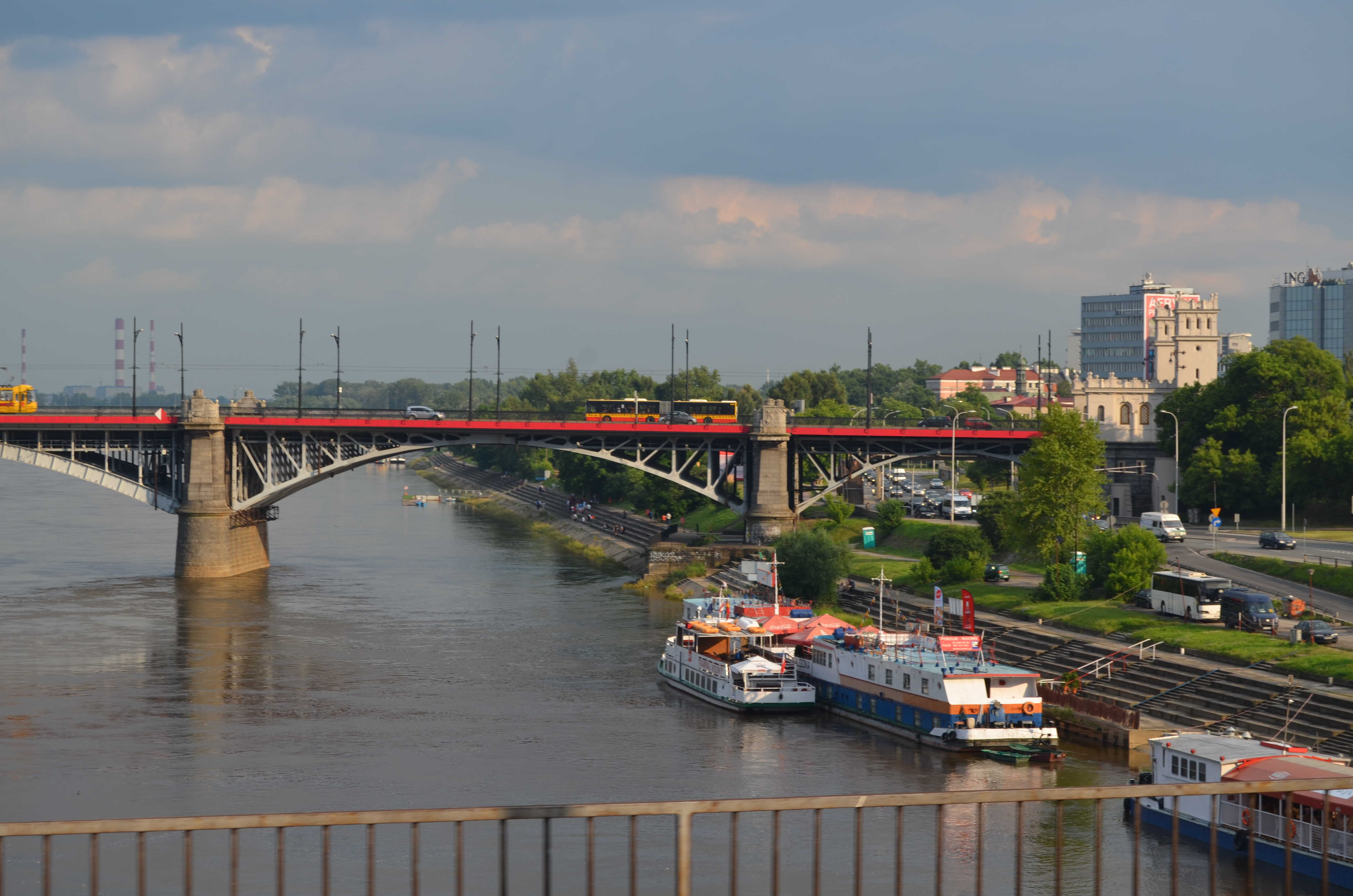 پښتو: Warsaw city